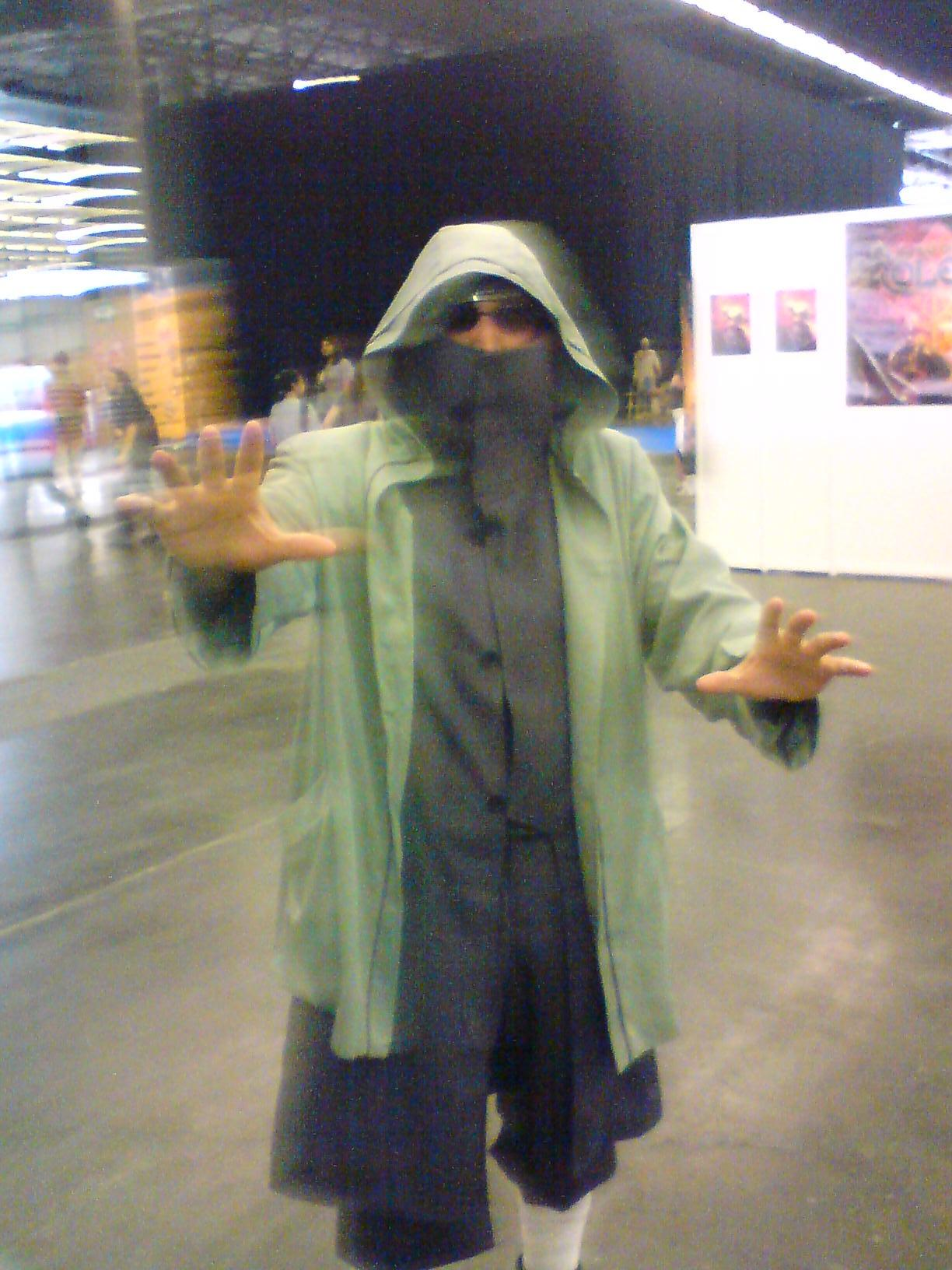 Photo prise au Japan Expo